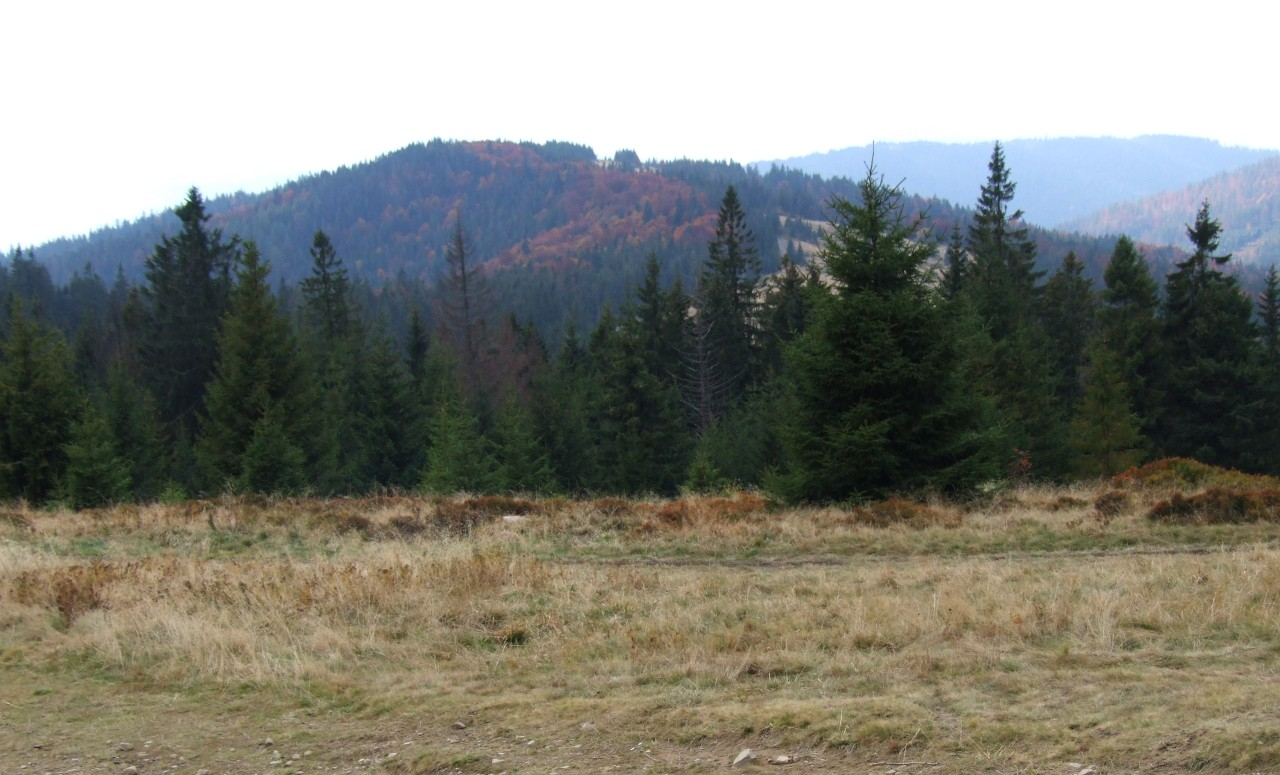 Widok na Bukowinę Miejską spod Kaplicy Papieskiej (Gorce)